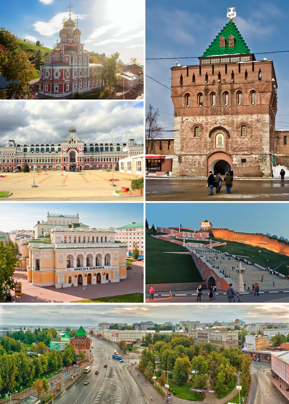 Коллаж для страницы о Нижнем Новгороде из фотографий: File:Stroganov Church.jpg File:Exhibition Hall of the Fair.jpg File:Dmitrovskaya Tower of Nizhny Novgorod Kremlin.jpg File:Nizhny Novgorod Drama Theatre spring.jpg File:Nizhny Novgorod. Chkalov Stairs 2014.jpg File:Minin and Pozharsky square-01.jpg